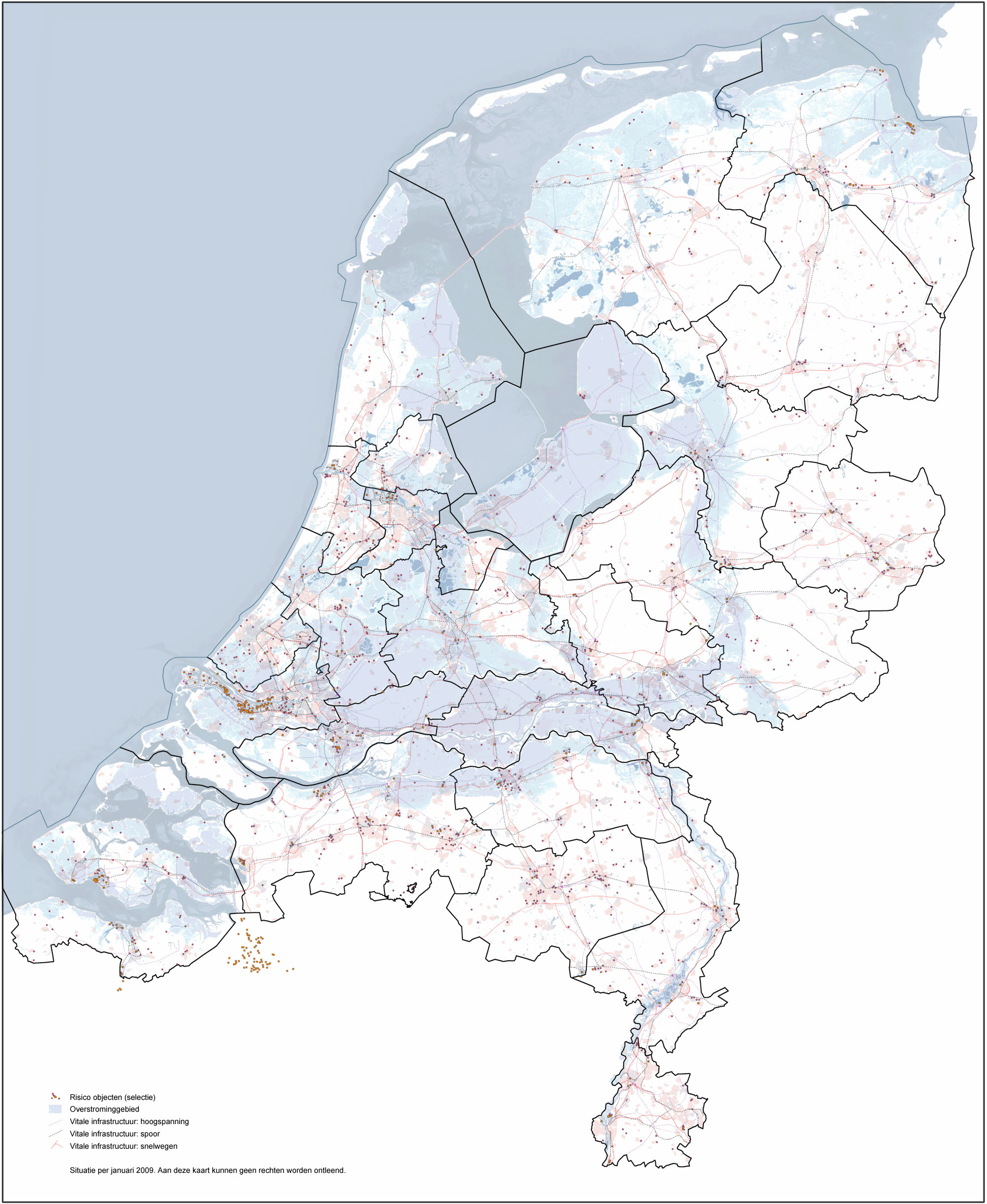 Risico-landkaart van de veiligheidsregio's (2009), met risico-objecten, gemodelleerd overstrominggebied en vitale infrastructuur (spoor, snelweg, hoogspanning). Bron van themadata: openbare publieke risicokaart ( ondergrond: eigen werk van Jan-Willem van Aalst, gerasterd in Photoshop. [De ondergrond van risicokaart.nl is copyright TD/Kadaster en dus niet gebruikt, maar de daarop geplotte data is vrij van copyright]